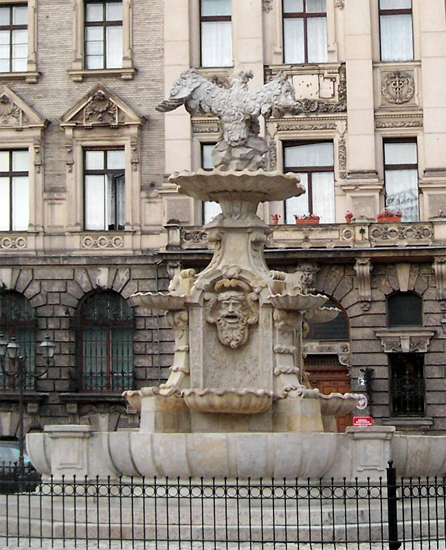 Fontanna Orła Białego WSzczecinie